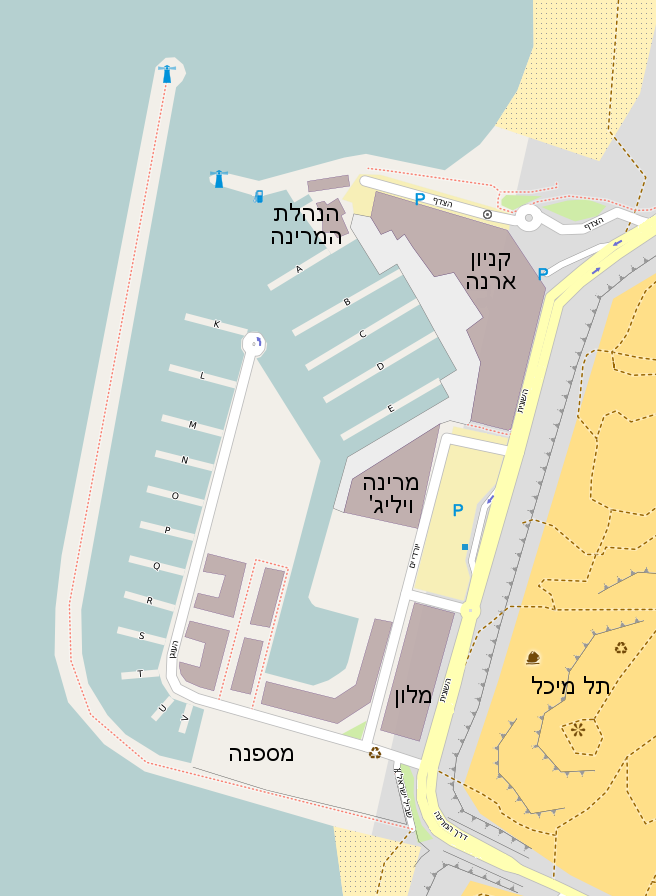 Marina Herzlia Map